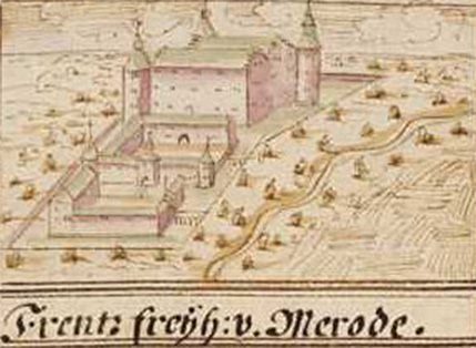 Ungenaue Darstellung der Burg Frenz im Codex Welser